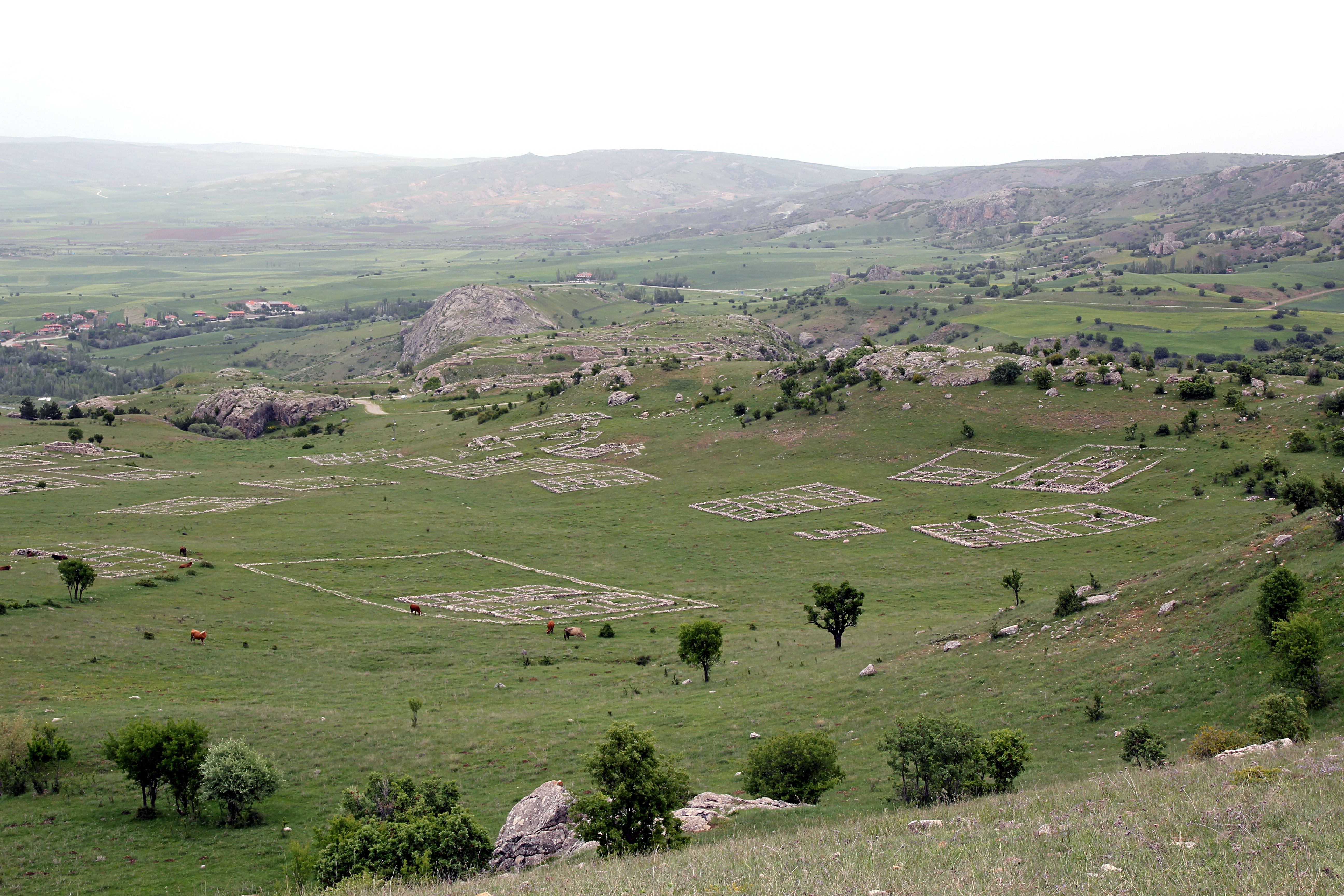 Ḫattuša, hethitische Hauptstadt bei Boğazkale, Zentraltürkei, Tempelviertel, im Vordergrund Tempel 4